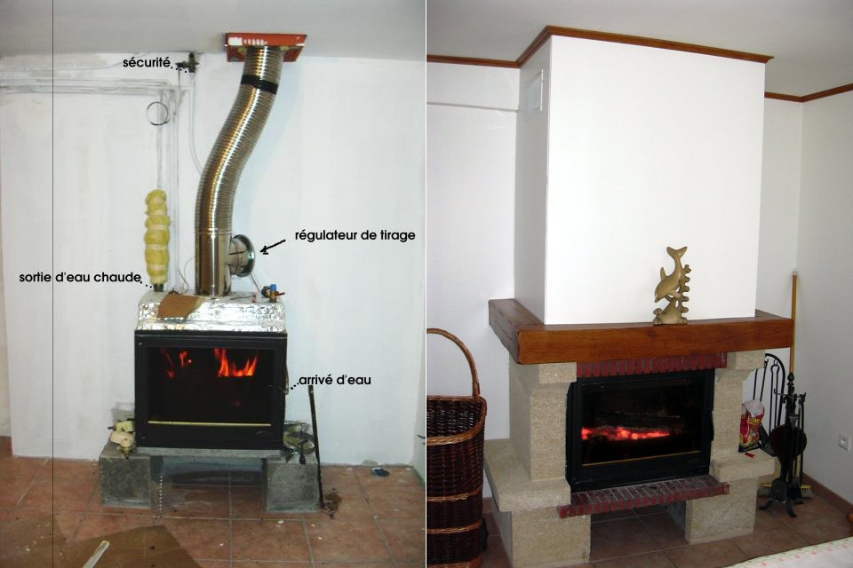 Chaudière de cheminée Auteur Xavier Bonnafous (Xulin)